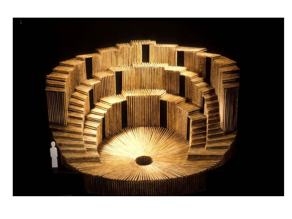 פר גינט